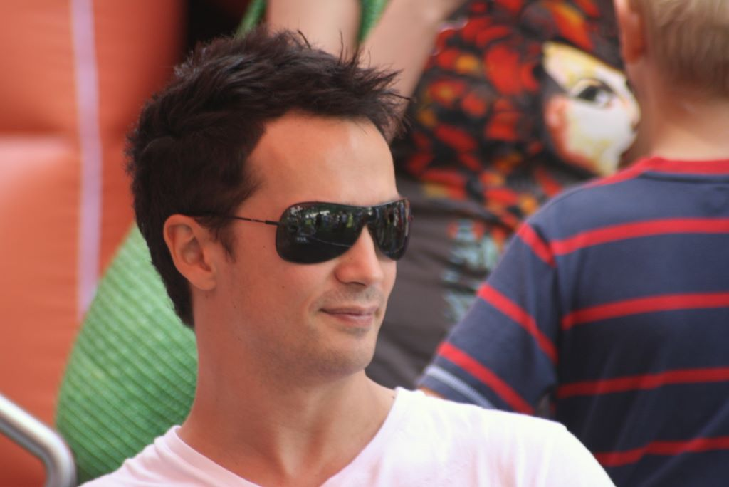 Rafał Cieszyński. Goleniów, 2007